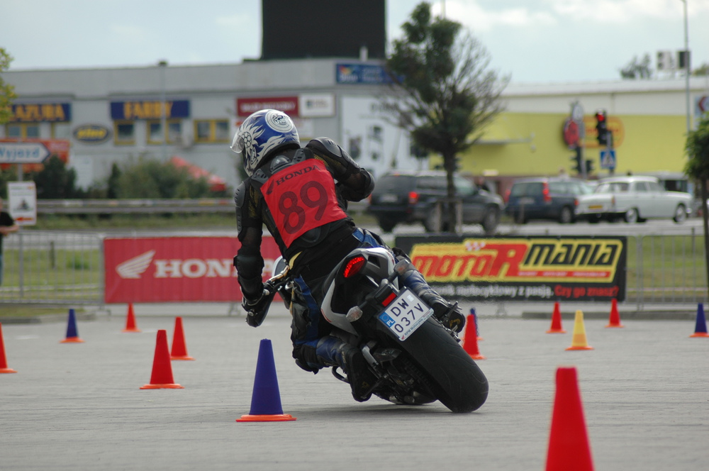 Beniamin Mucha, vicemistrz sezonu 2012 Honda Gymkhana, w czasie przejazdu na rundzie finałowej, Warszawa - Marki, 16 września 2012